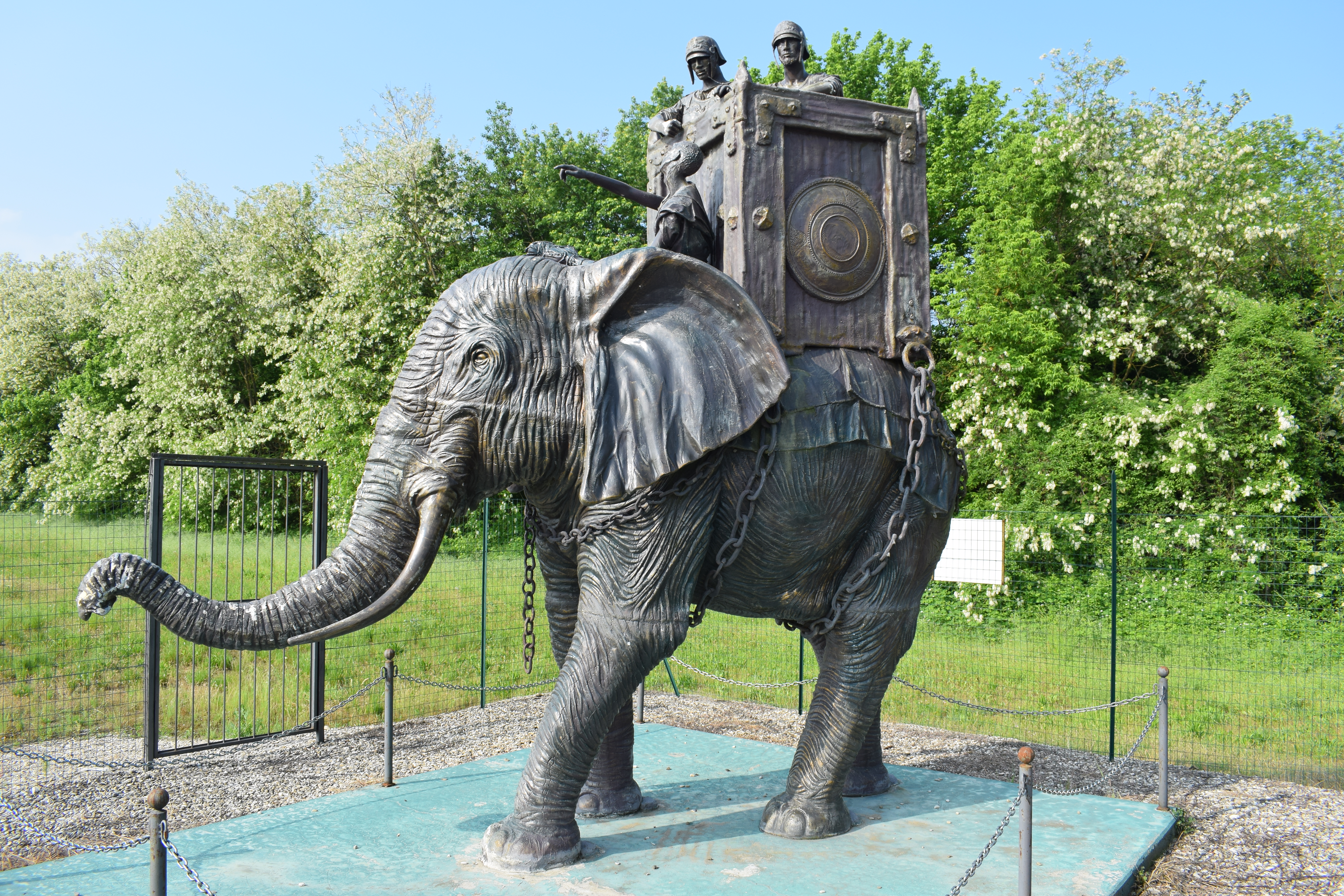 Mémorial de la bataille de la Trebbia (218 av. J.-C.) représentant un des éléphants carthaginois, Rivalta Trebbia, Italie